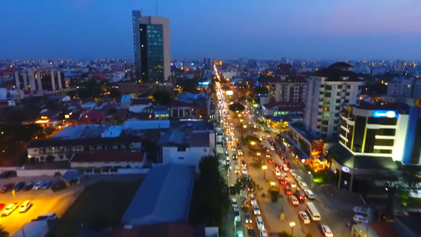 Palacio de Justicia de noche